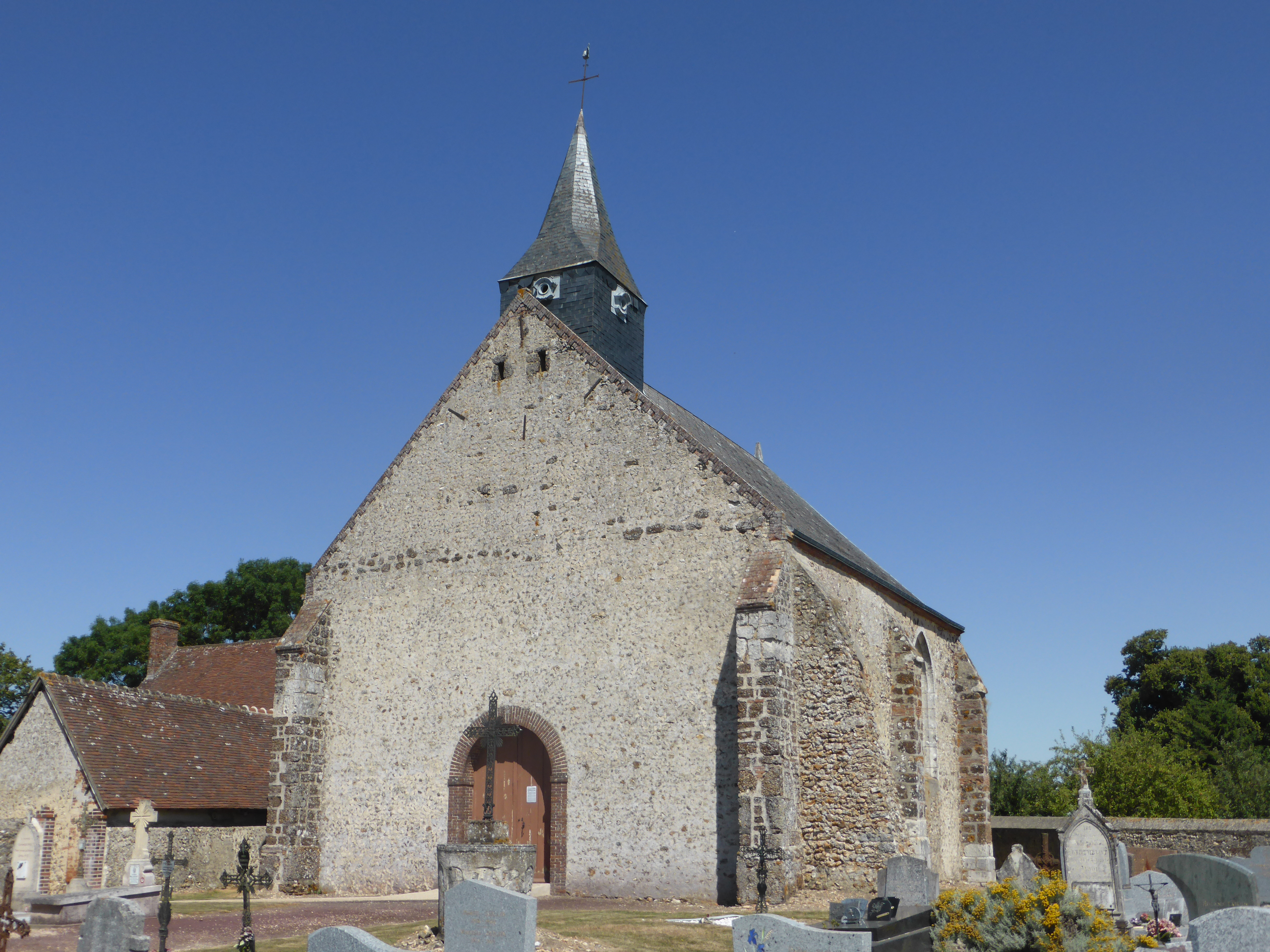 Église Notre-Dame d'Ardelles, en Eure-et-Loir.